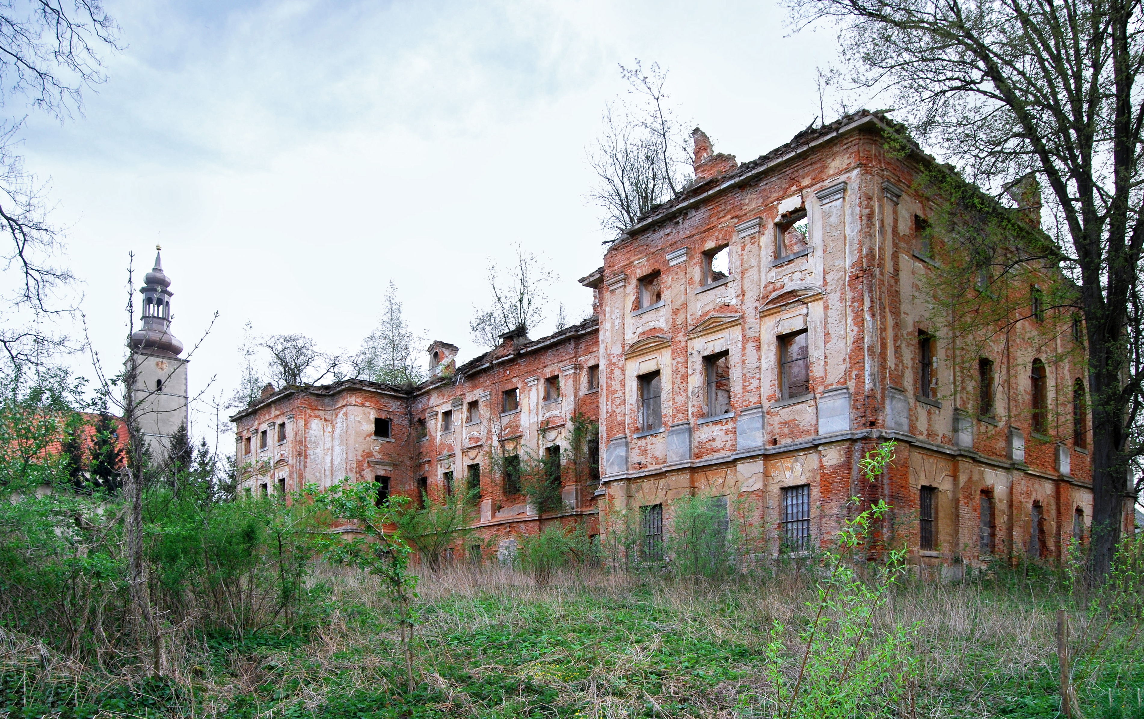 Pałac (ruina), 1734, Rząśnik, pow. złotoryjski